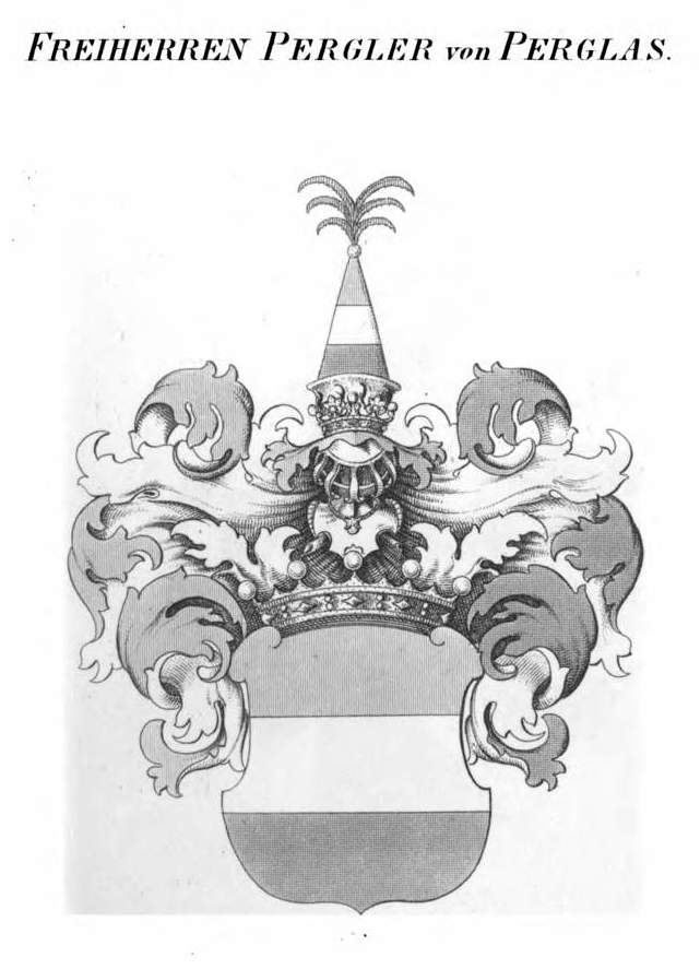 Wappen Freiherren Pergler von Perglas